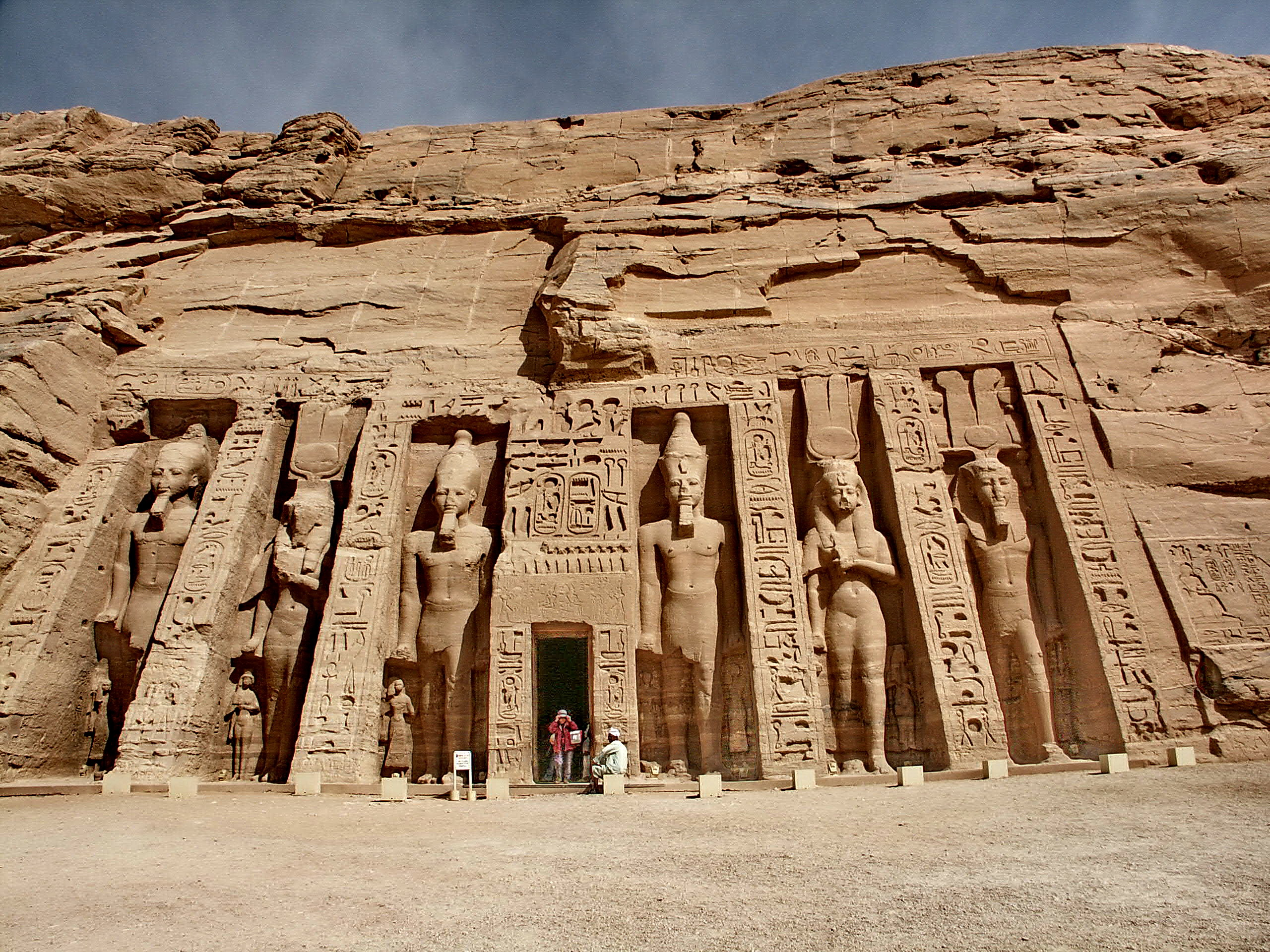 Abu Simbel 阿布辛貝神廟